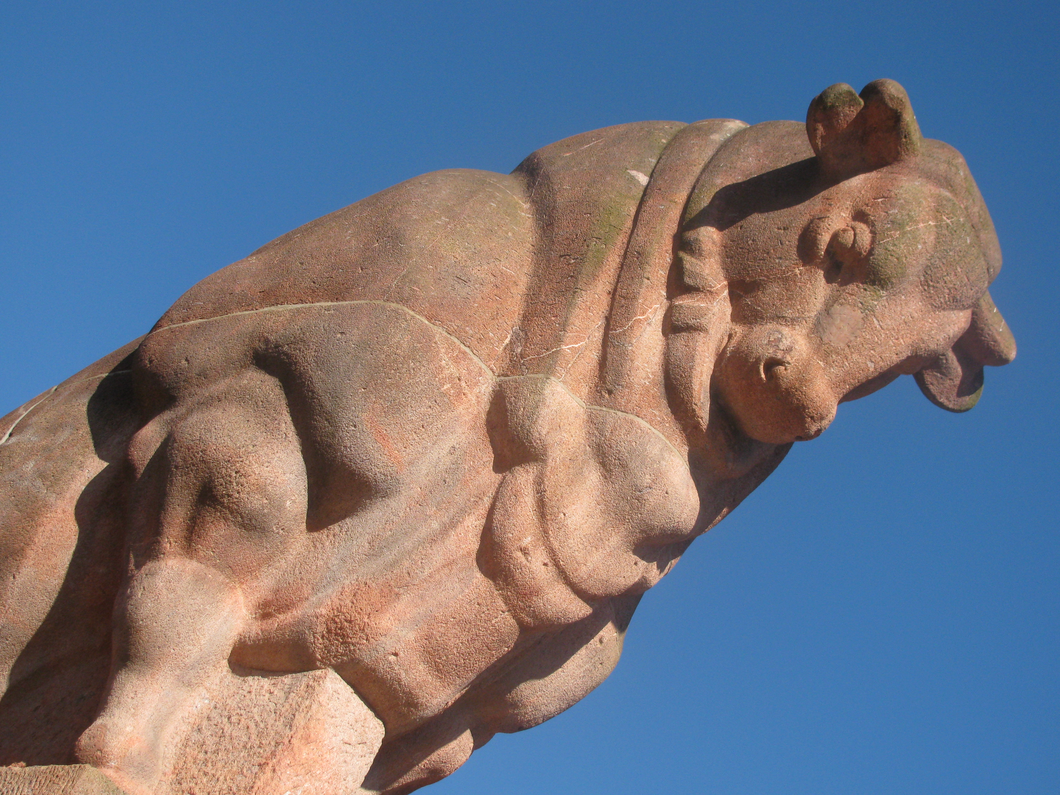 Stierfigur am Fruchtbarkeitsbrunnen, Arnswalder Platz, Berlin